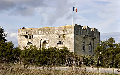 Le fort du Grouin, Loix - Île de ré - Charente-Maritime